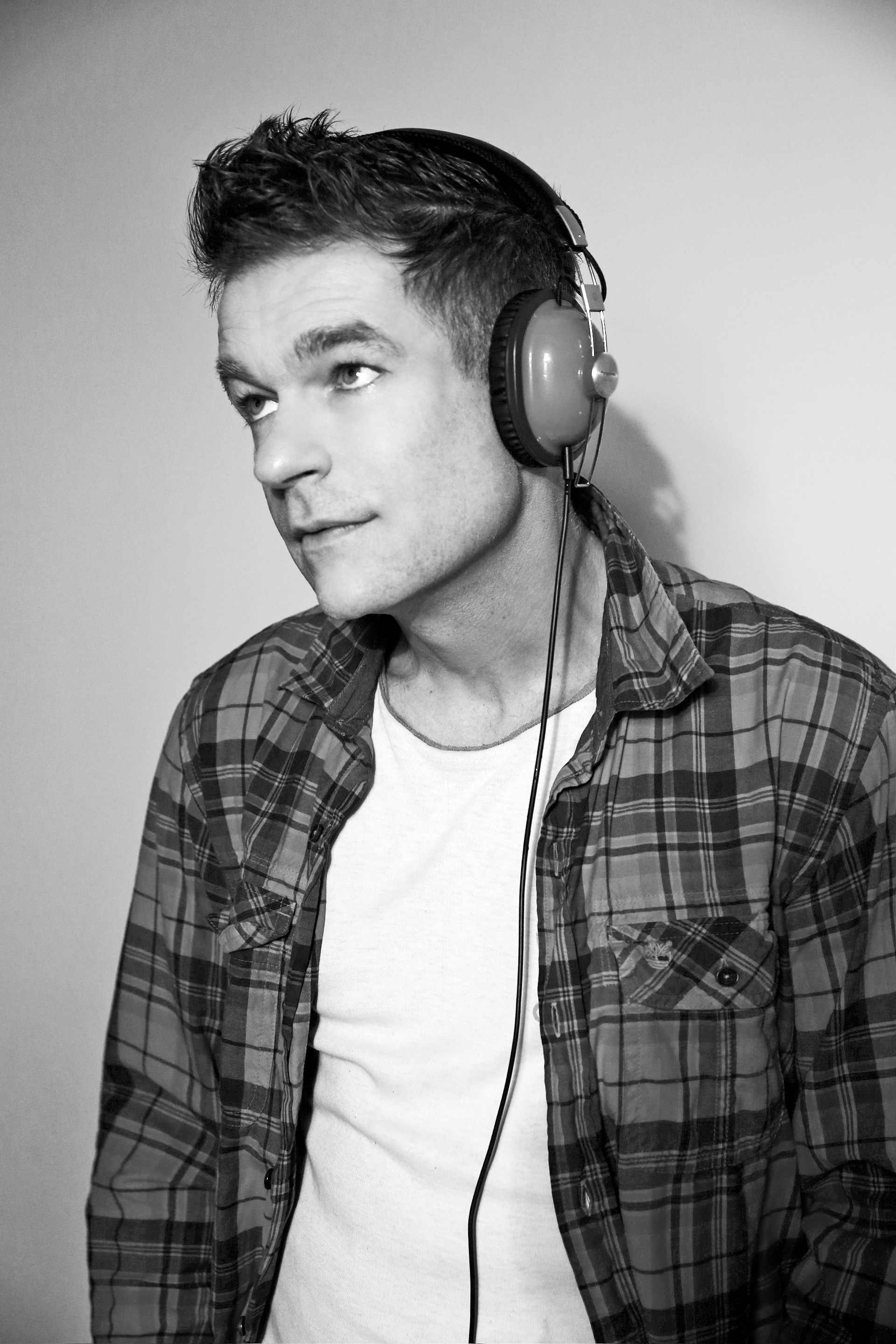 Peter Plate Januar 2013